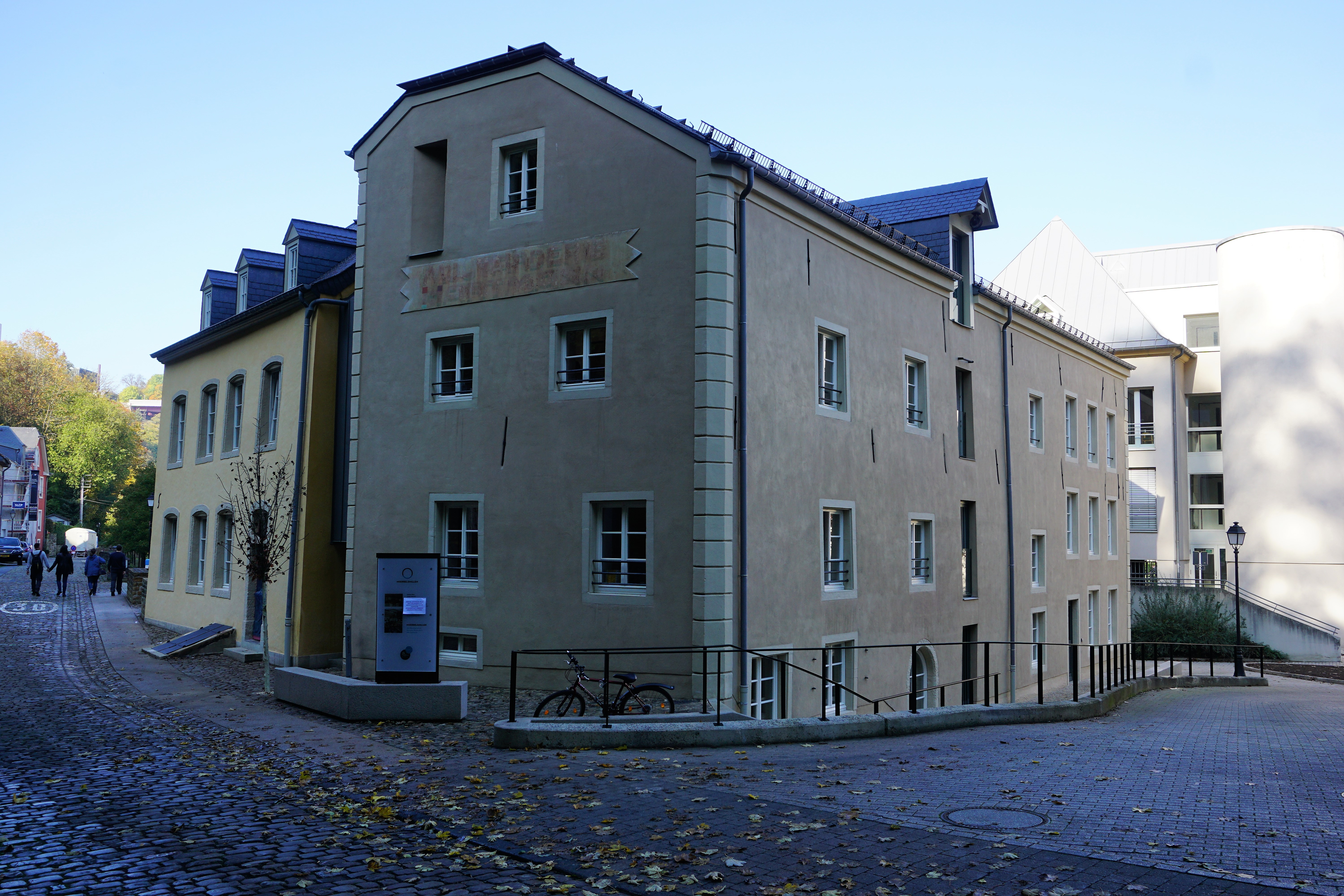 Luxembourg: reconversion de l'ancien moulin Mohrfels (Muerbelsmillen) par une remise en état et transformation de l'ancienne moutarderie à Pfaffenthal (rue Mohrfels). Vue sur le bâtiment de l'ancien moulin proprement dit et - à gauche - sur la maison "Flohr".